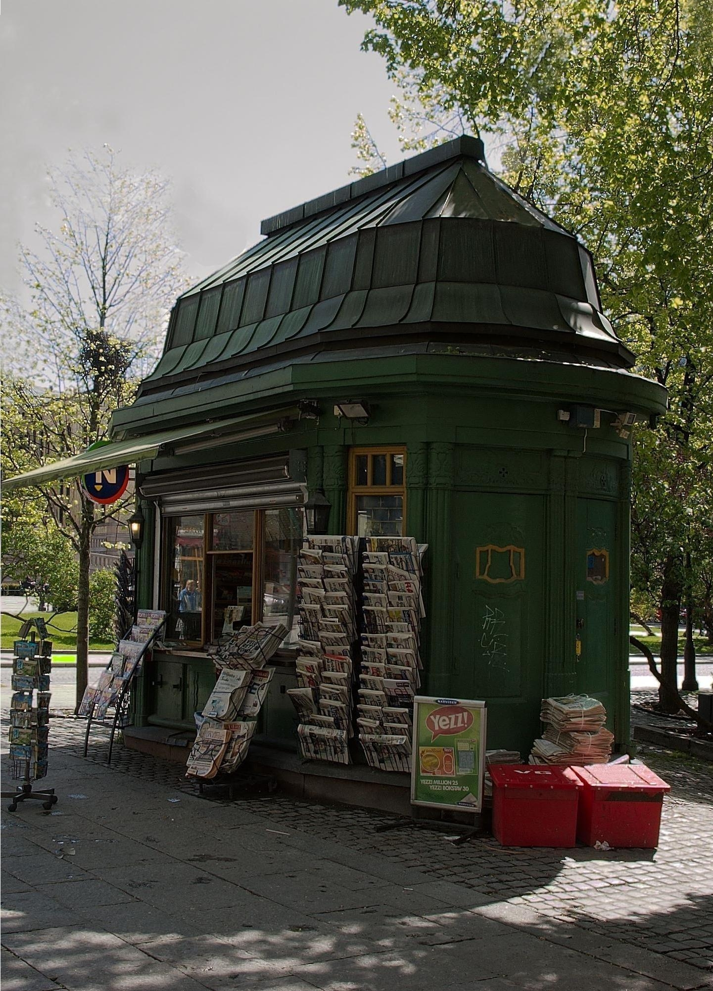 Centrum Narvesenkiosk på hjørnet av Karl Johans gate og Rosenkrantz' gate, Oslo. Arkitekt Erik Glosimodt.